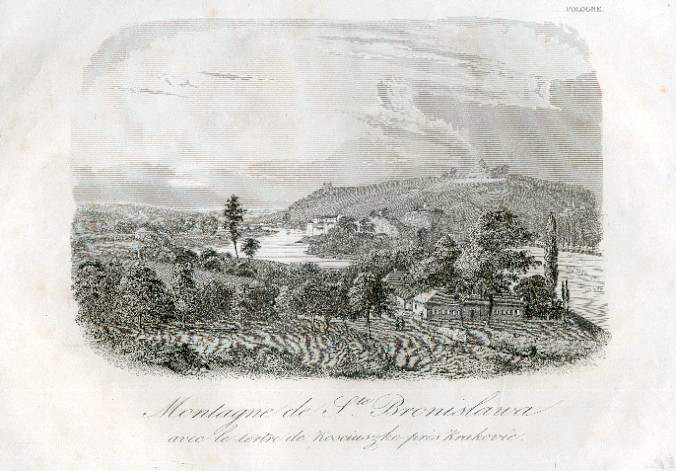 staloryt z akwafortą. Wzgórze św. Bronisławy z kopcem Kościuszki, z "La Pologne" L. Chodźki (tom 2, Paryż 1836-1837)